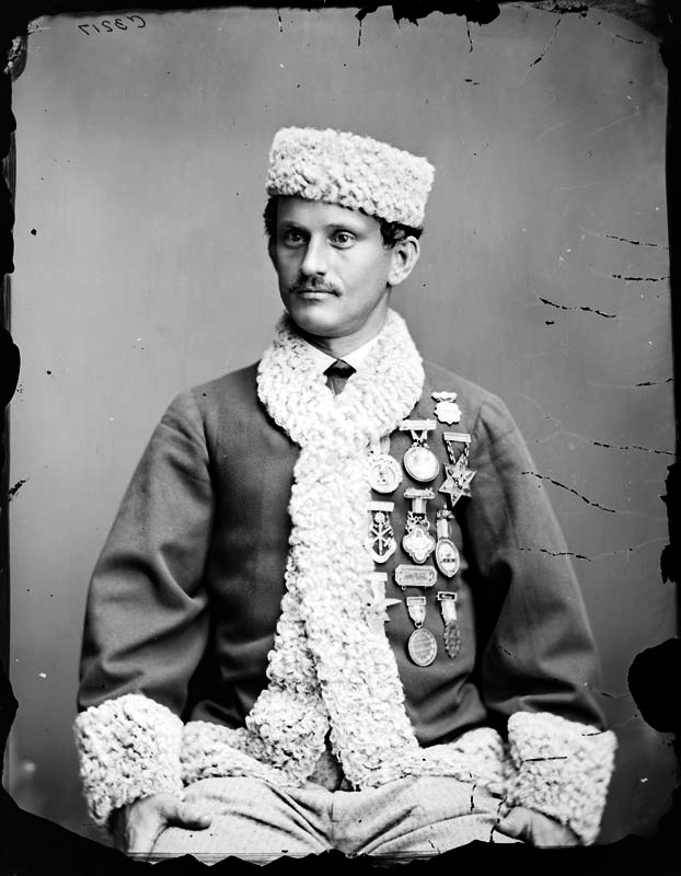 Konståkaren Jackson Haines